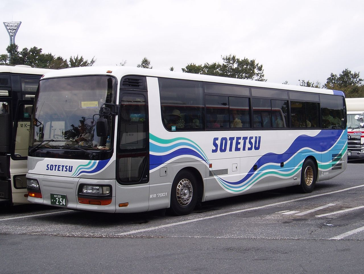 Sotetsu 7901 Isuzu KC-LV781R1 at Gotemba Service Area